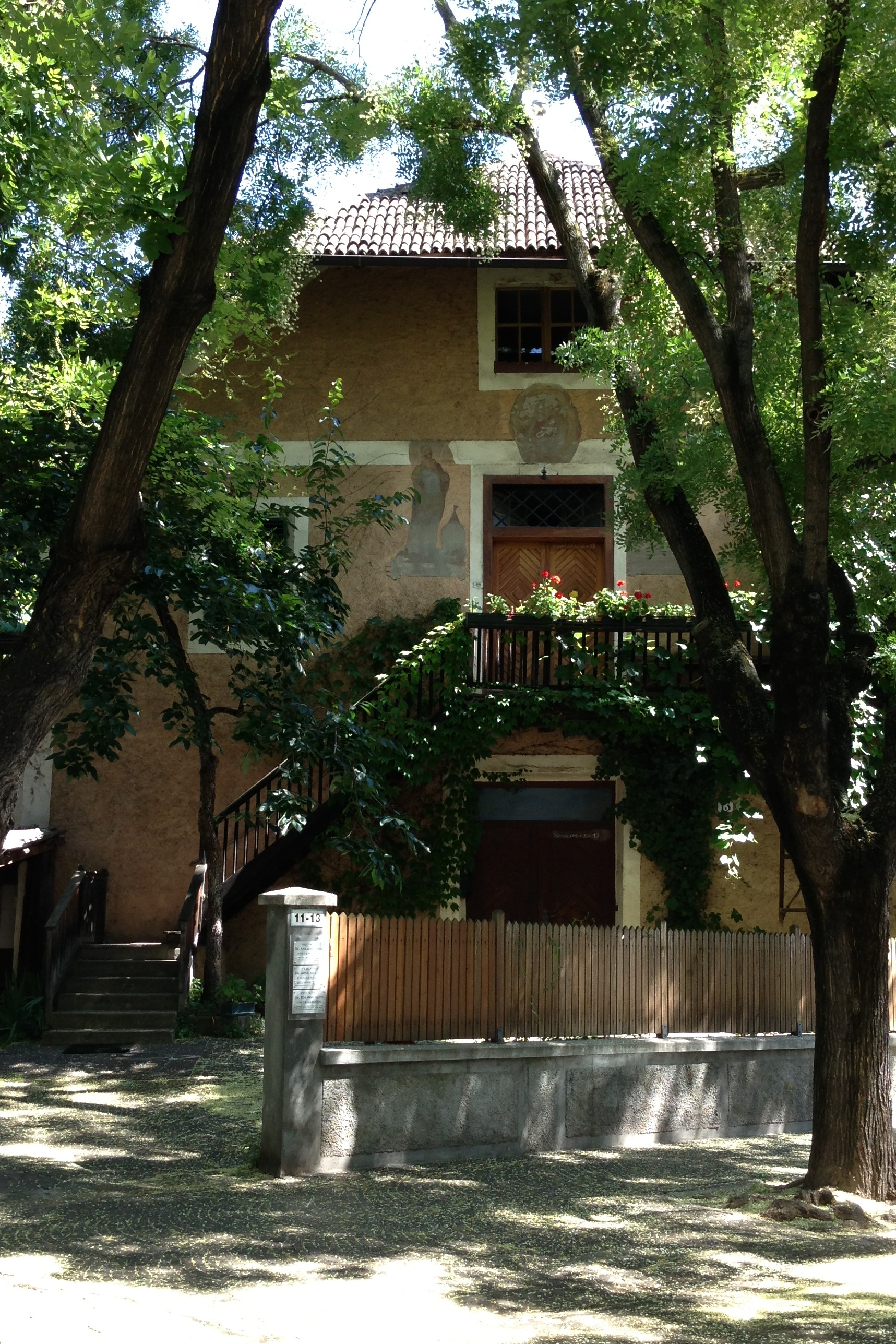 Der Guglerhof in Quirein in Bozen. Am Hof befinden sich Reste der Krypta der Kirche St. Quirin)